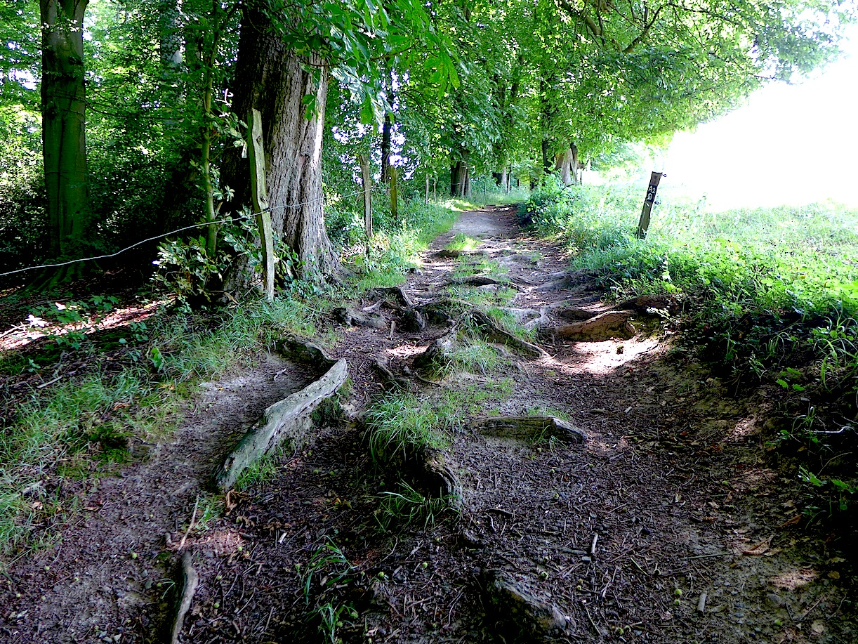 Этап "Невигес-Нордрат" маркированного турмаршрута "Тропа Неандерланд", Северный Рейн-Вестфалия, Германия.